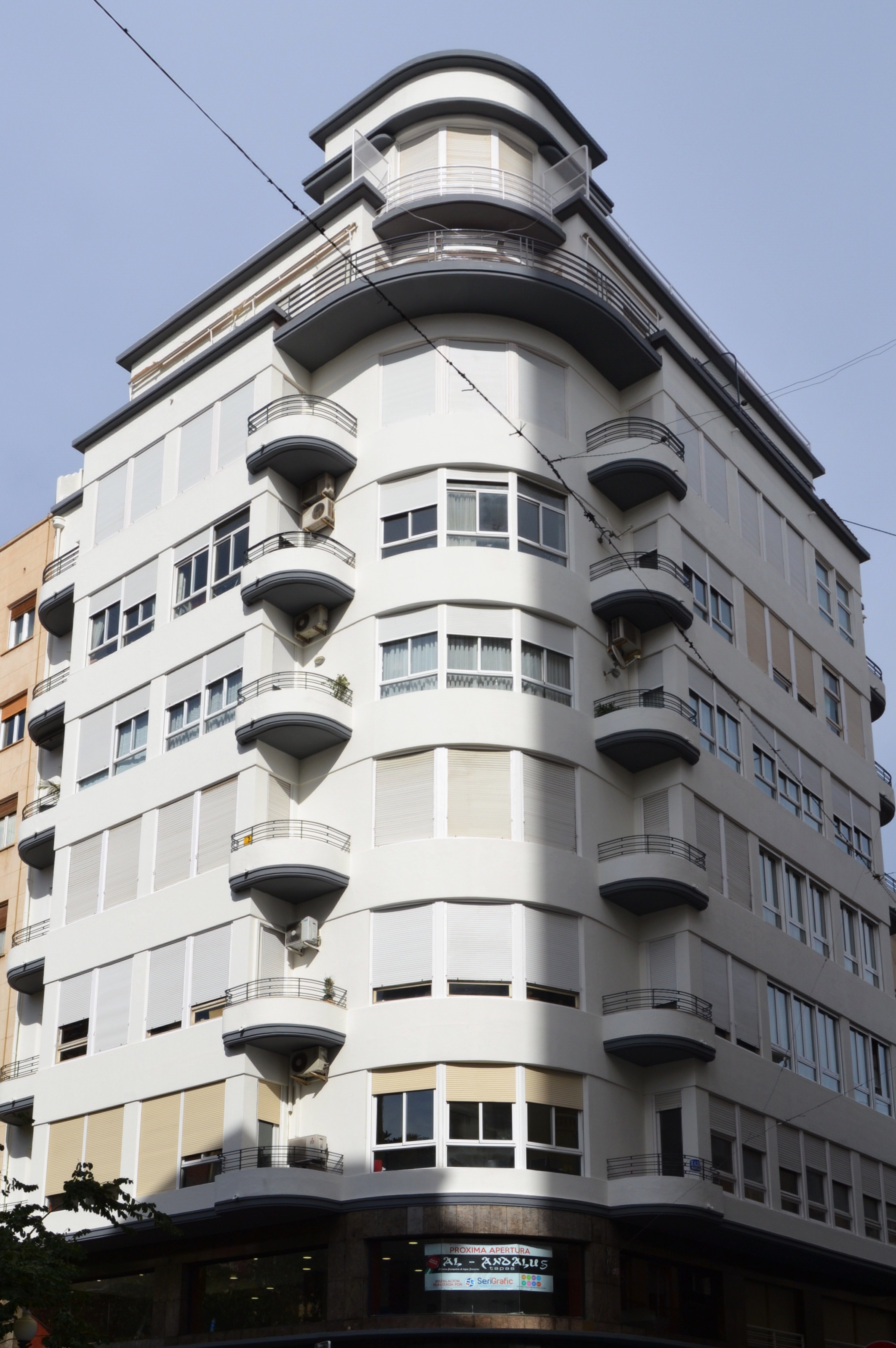 Edifici Roma d'Alacant.